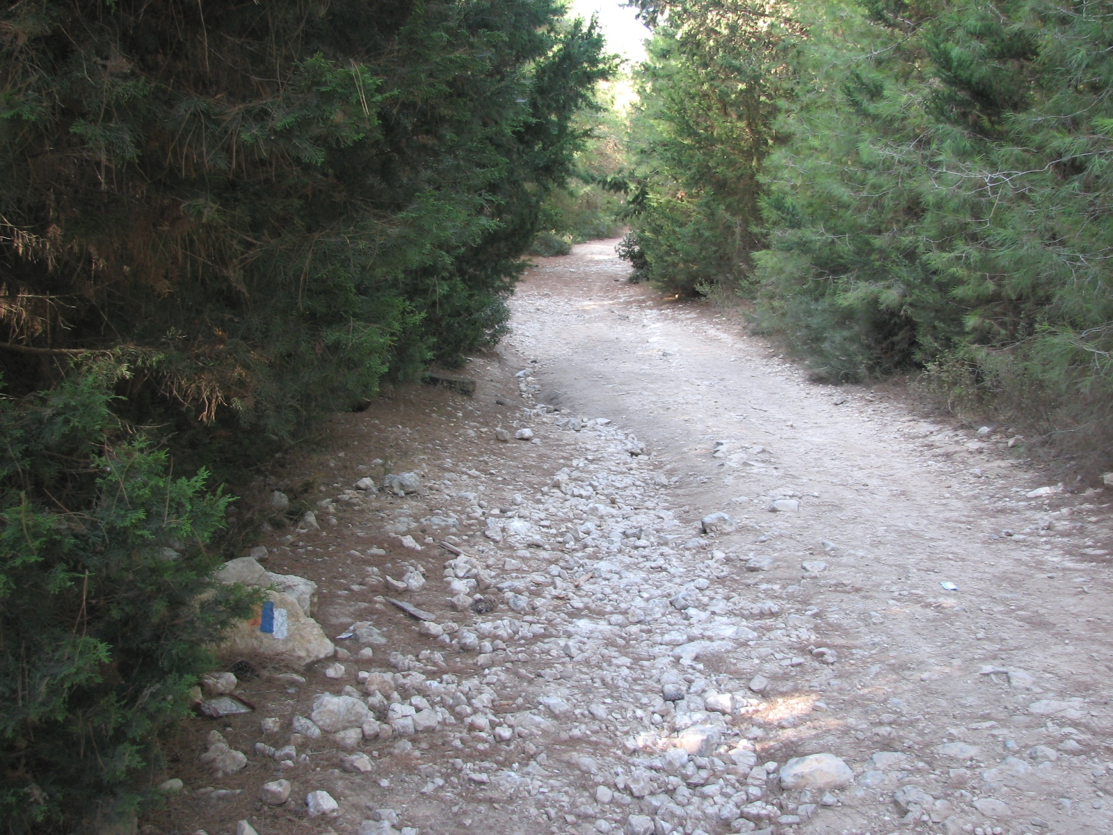 Wadi khik - Mount Carmel Part of Israel National Trail נחל חיק זורם במורדותיו המערביים של הר הכרמל. ראשית הנחל באזור הכרמל הגבוה ליד היישוב עוספיה ליד נקודת רום כרמל . הוא זורם מקו פרשת המים לכוון מערב ונשפך לנחל אורן. הנחל הוא חלק ממסלול שביל ישראל.